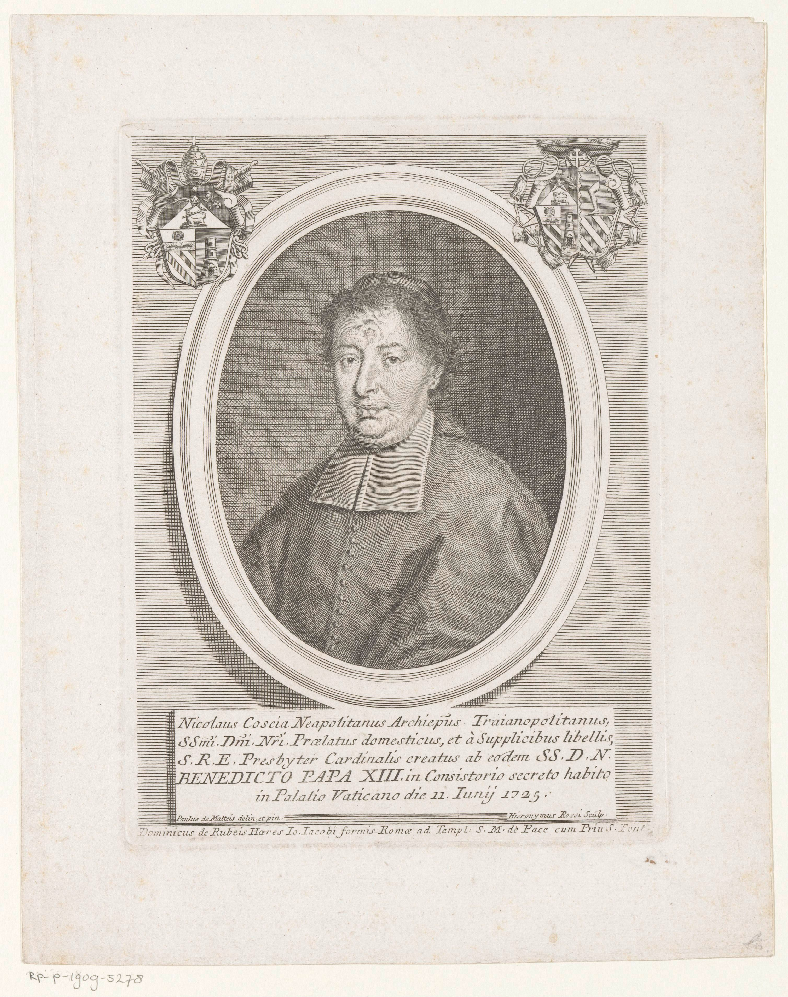 IdentificatieTitel(s): Portret van kardinaal Niccolò CosciaObjecttype: prent Objectnummer: RP-P-1909-5278Opschriften / Merken: verzamelaarsmerk, verso, gestempeld: Lugt 2228VervaardigingVervaardiger: prentmaker: Girolamo Rossi (II) (vermeld op object)naar schilderij van: Paolo de Matteis (vermeld op object)uitgever: Domenico de'Rossi (vermeld op object)verlener van privilege: Pauselijk hof (vermeld op object)Plaats vervaardiging: prentmaker: Romenaar schilderij van: Italiëuitgever: Romeverlener van privilege: VaticaanstadDatering: 1725 - 1762Fysieke kenmerken: gravureMateriaal: papier Techniek: graveren (drukprocedé)Afmetingen: plaatrand: h 220 mm × b 165 mmOnderwerpWat: historical personscardinalWie: Niccolò CosciaVerwerving en rechtenVerwerving: aankoop 1905Copyright: Publiek domein